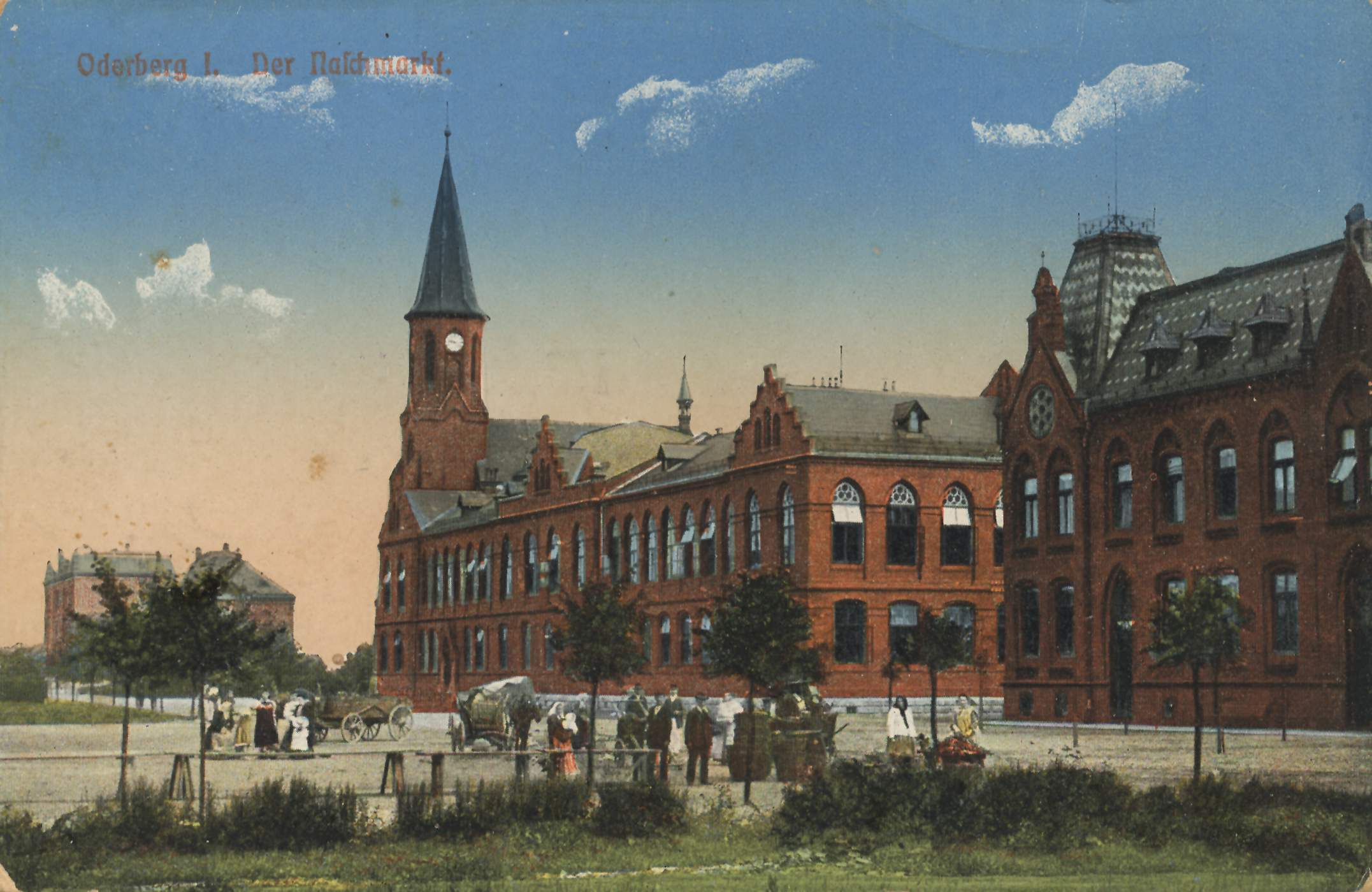 Naschmarkt